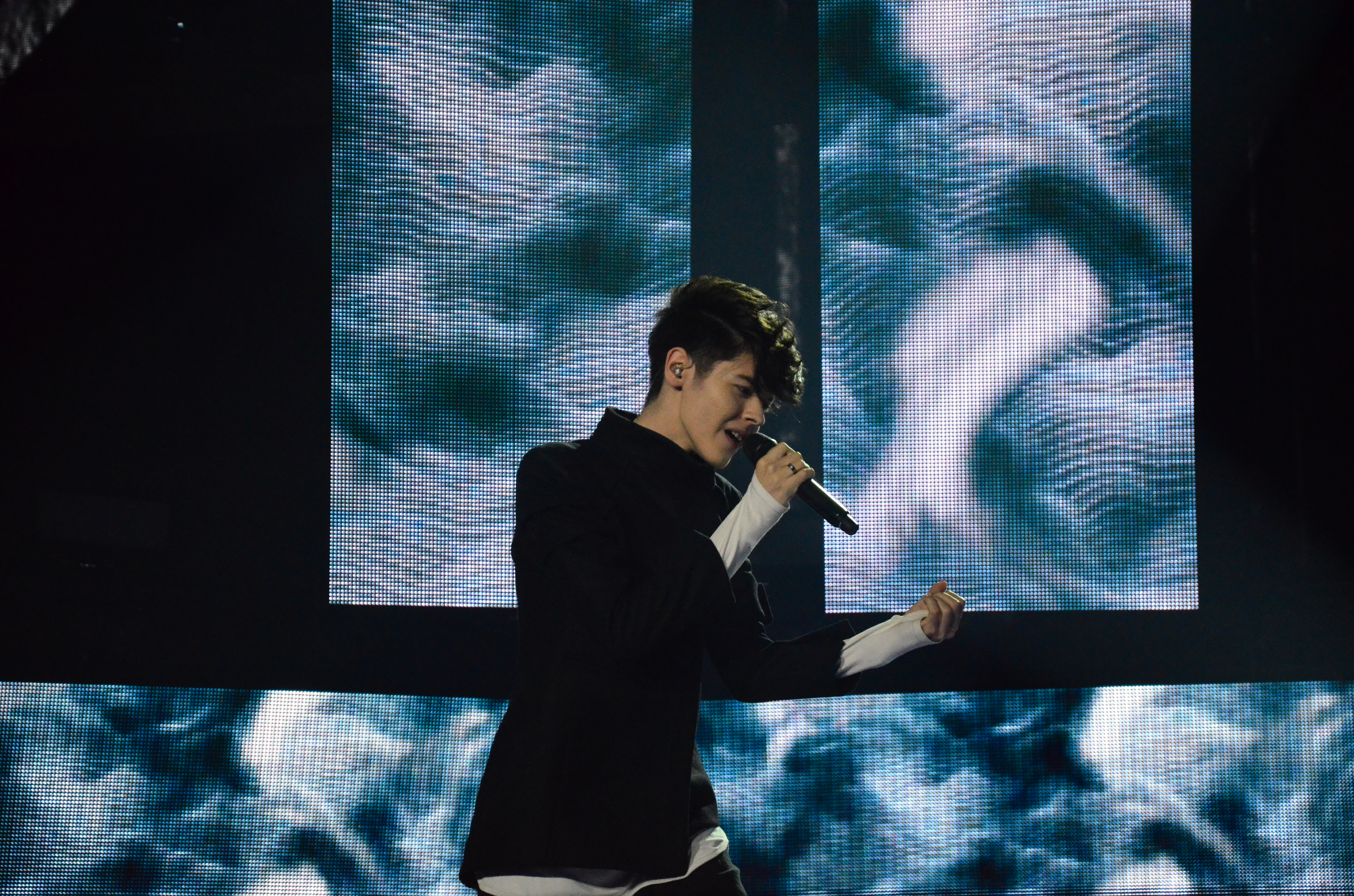 12 травня. Генеральна репетиція фіналу Євробачення 2017. Kristian Kostov (Bulgaria)